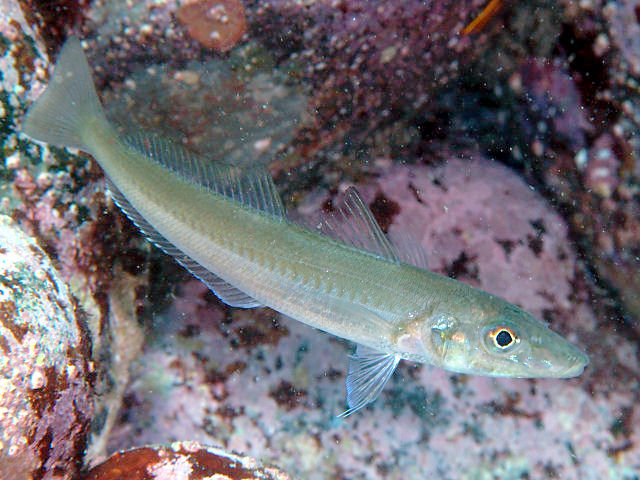 シロギス Sillago japonica